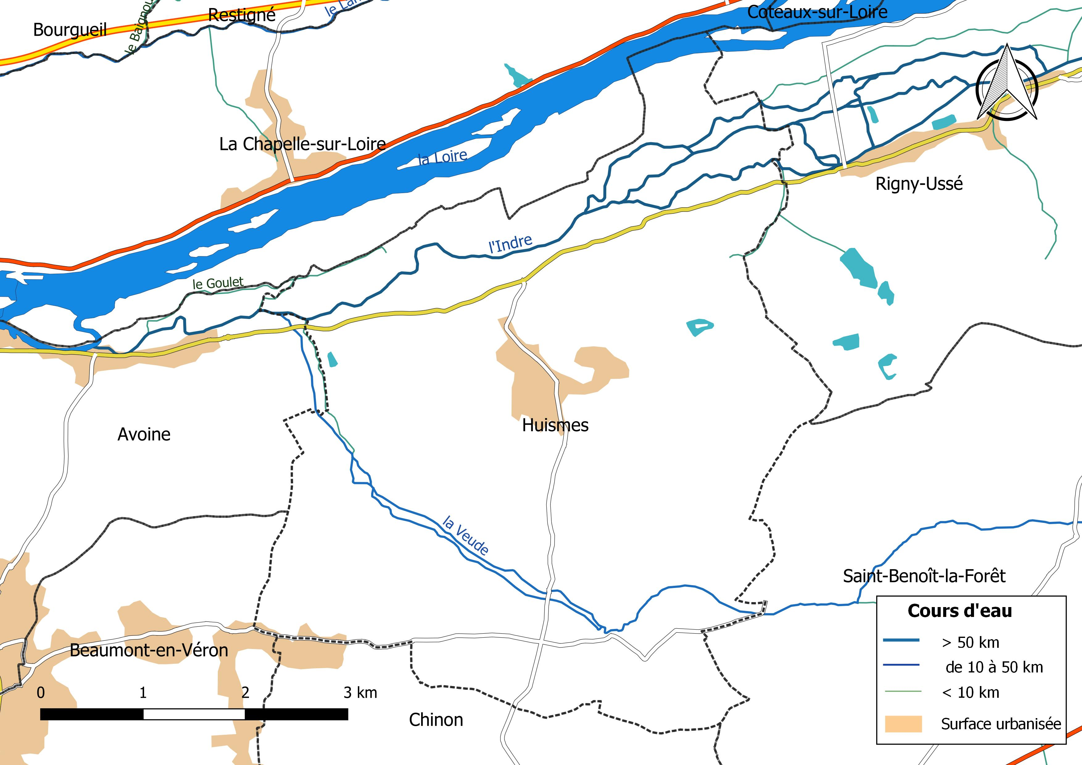 Carte du réseau hydrographique de la commune de Huismes (France).